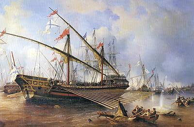 Rysk galär i sjöslaget vid Flisö